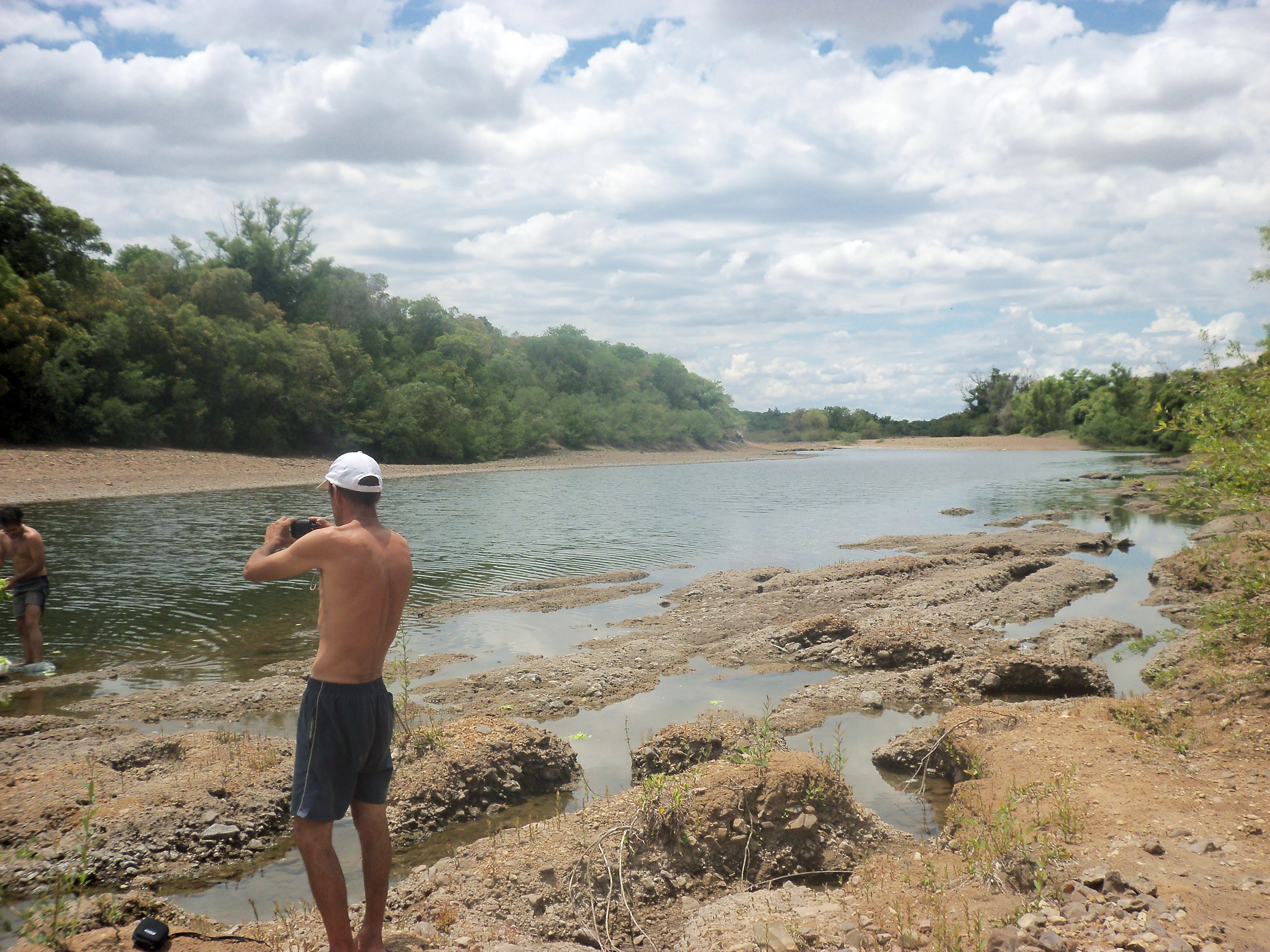 Arroyo Catalán próximo a recibir afluencia del Arroyo Catalancito